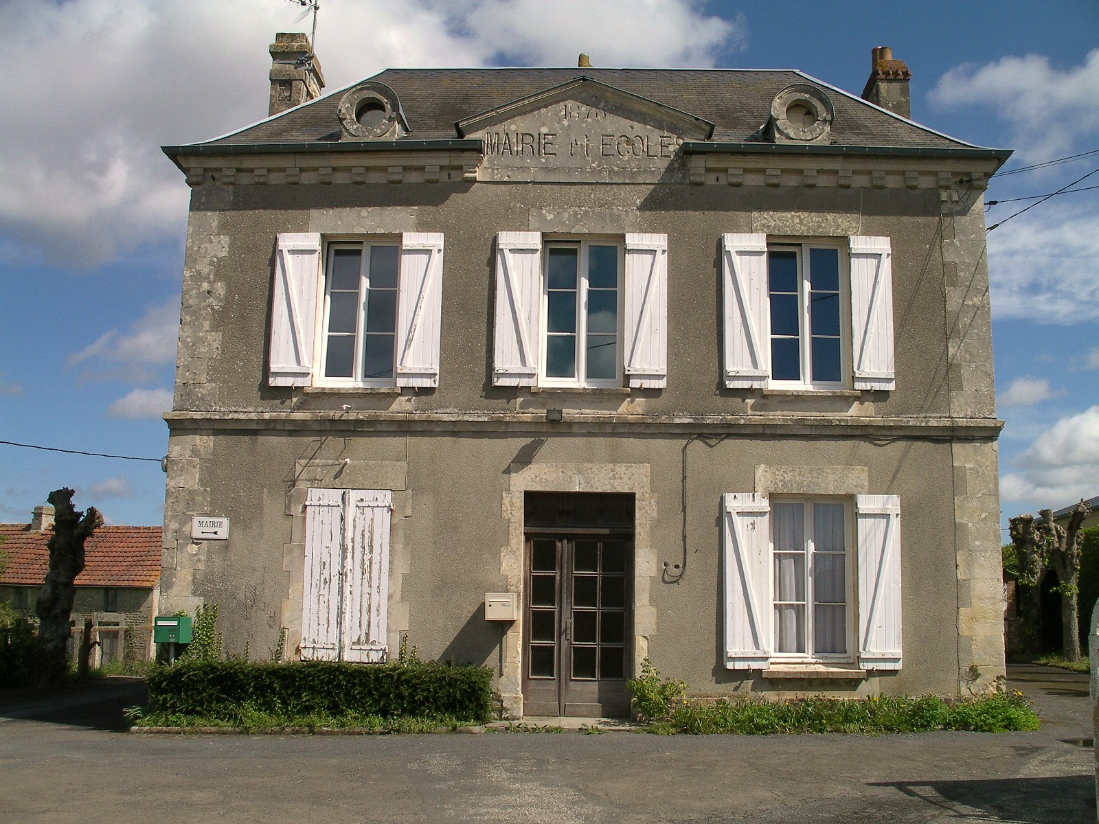 Mairie Ecole (1878) à Espins (Calvados)